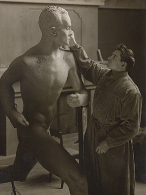 Wäinö Aaltonen works on his bronze statue of Paavo Nurmi in his atelier in Hirvensalo.